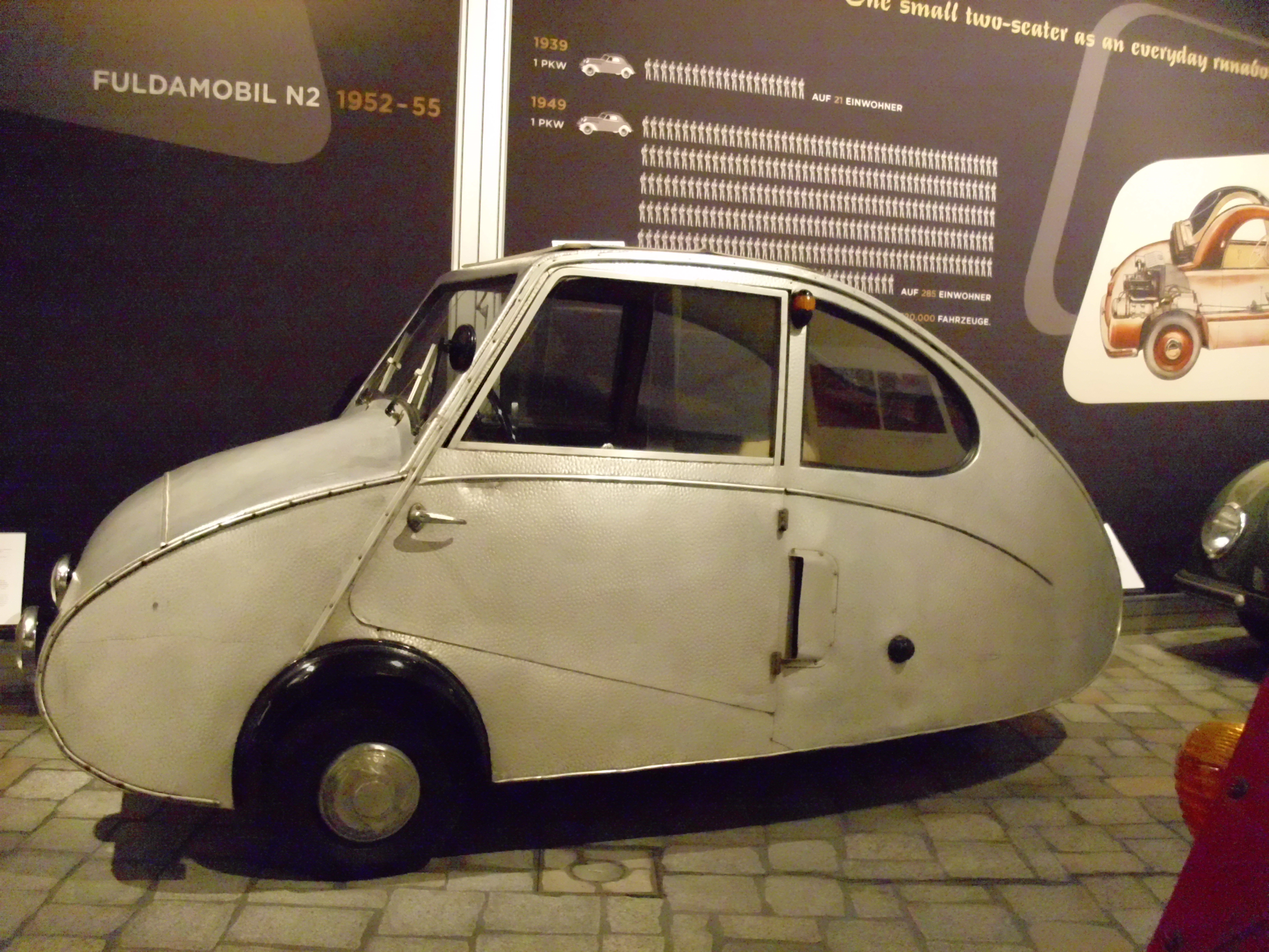 Fuldamobil N-2 1952-1955